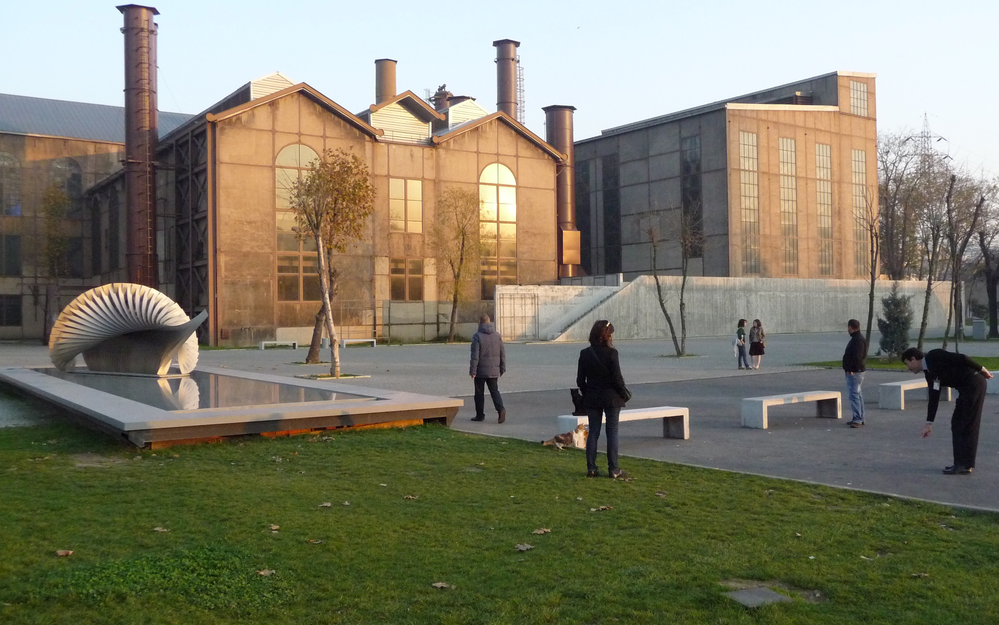 Sunset at SantralIstanbul